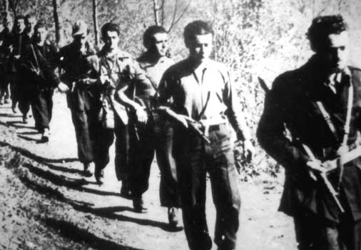 Partigiani in movimento durante la Resistenza